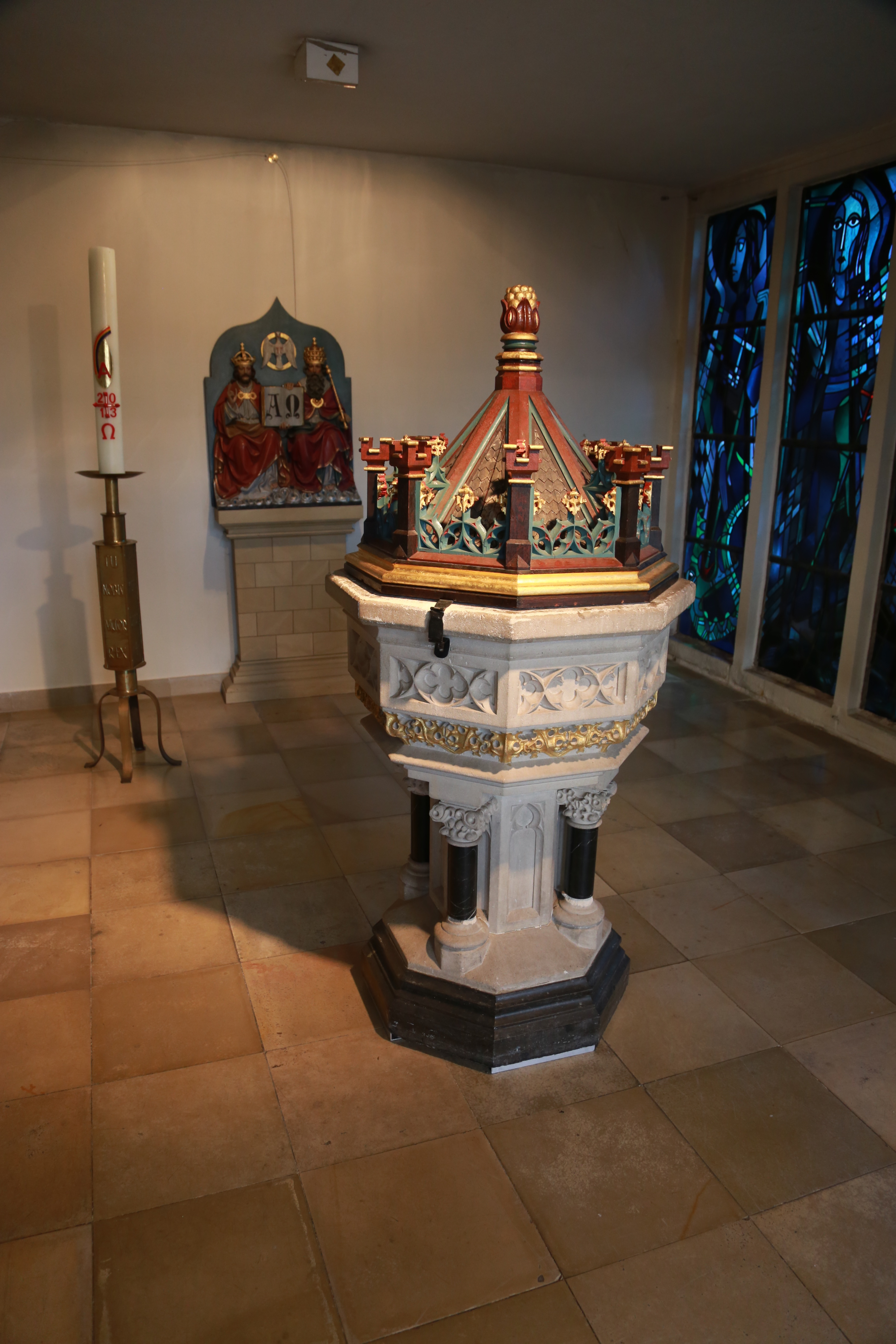 Das Taufbecken der ehemaligen Pfarrkirche St. Josef Kupferdreh